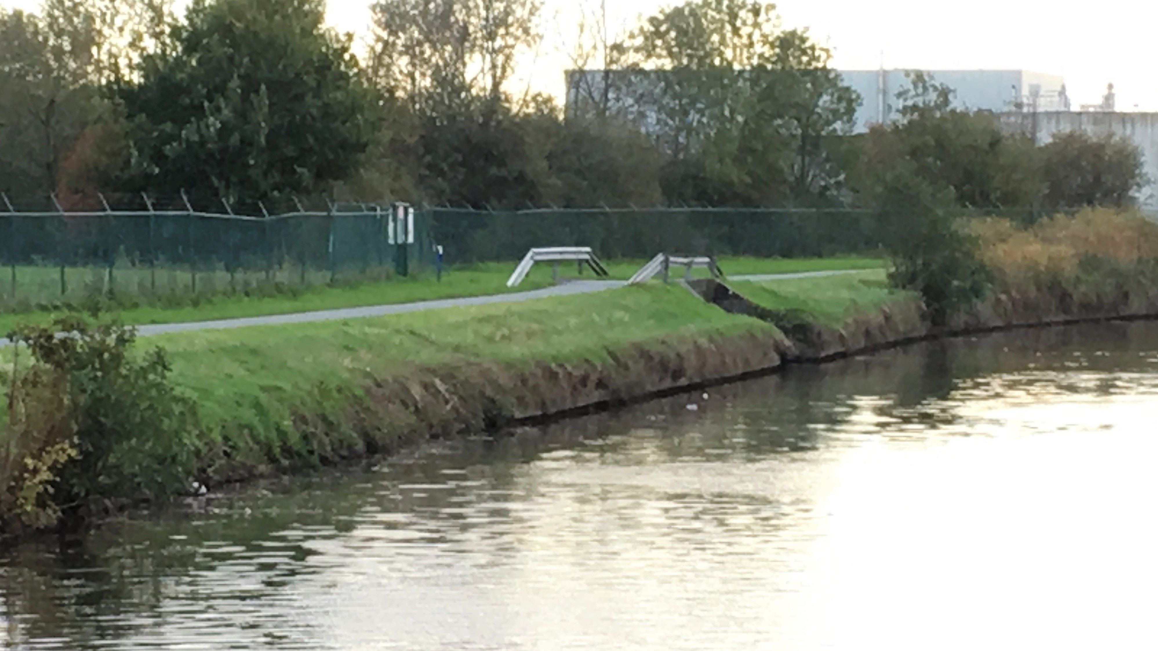 Monding van de Bellebeek in de Dender nabij de rioolwaterzuiveringsinstallatie van Liedekerke